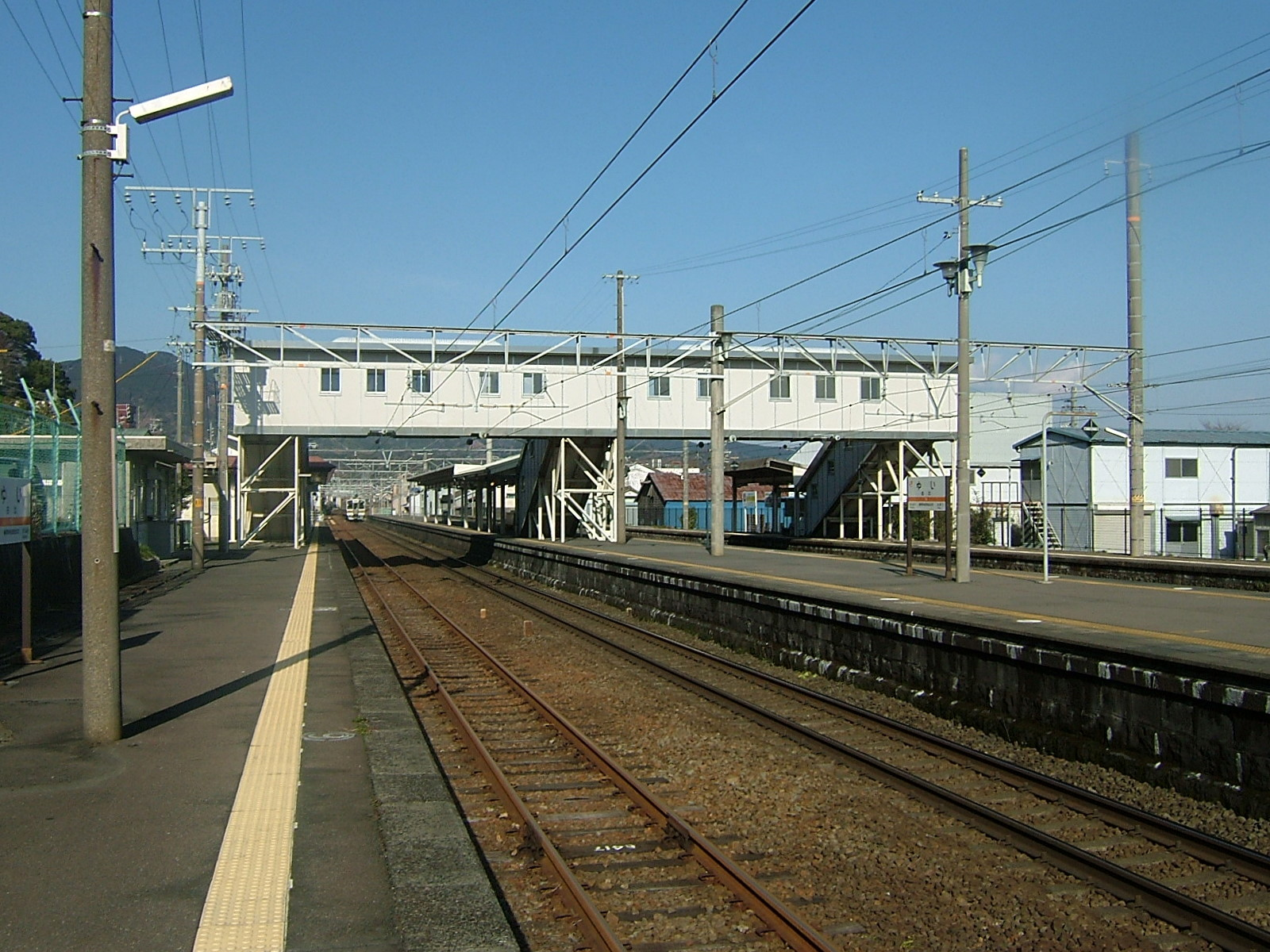 東海道本線由比駅プラットホーム（１番線より撮影）